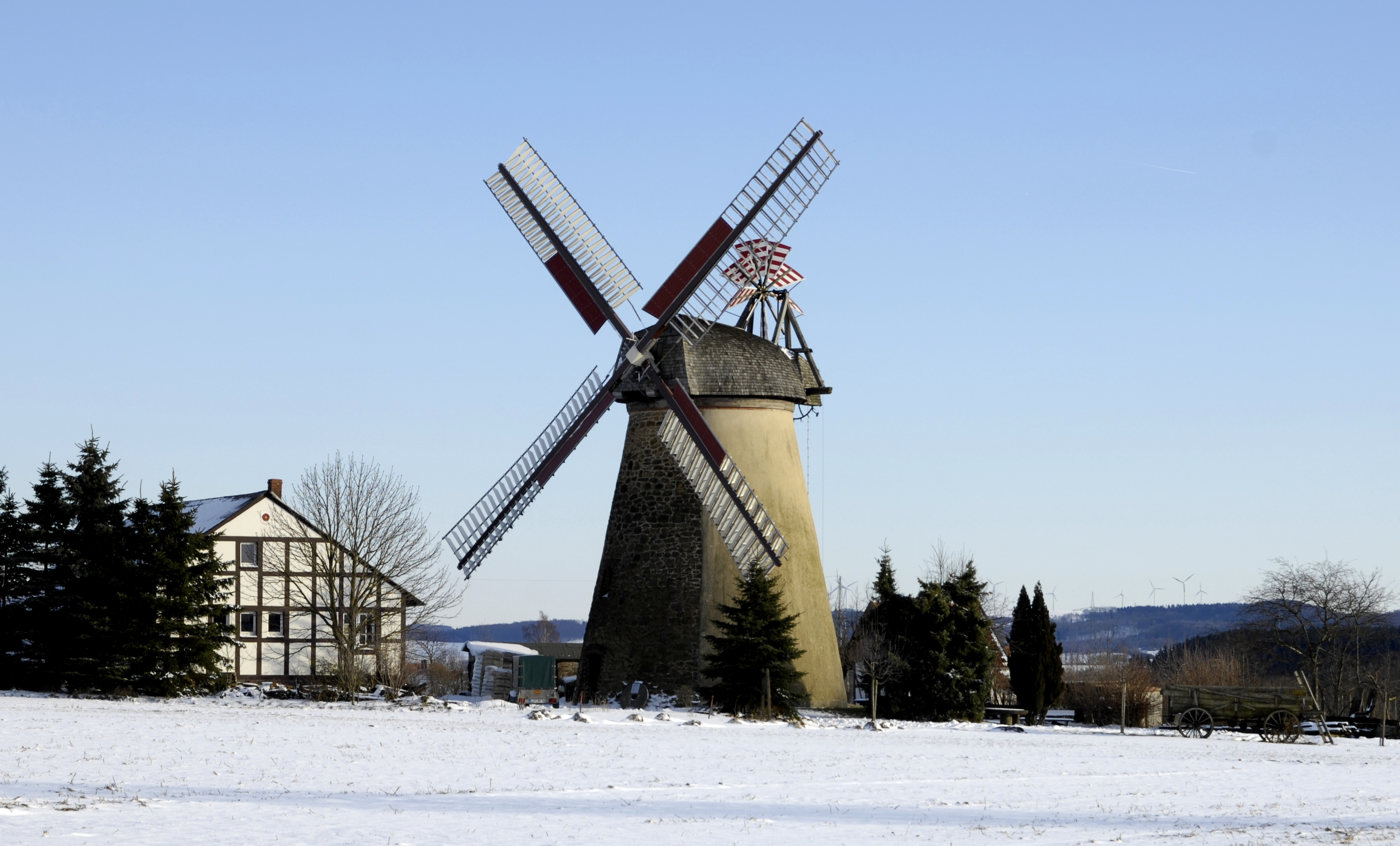 Windmühle in Bendorf